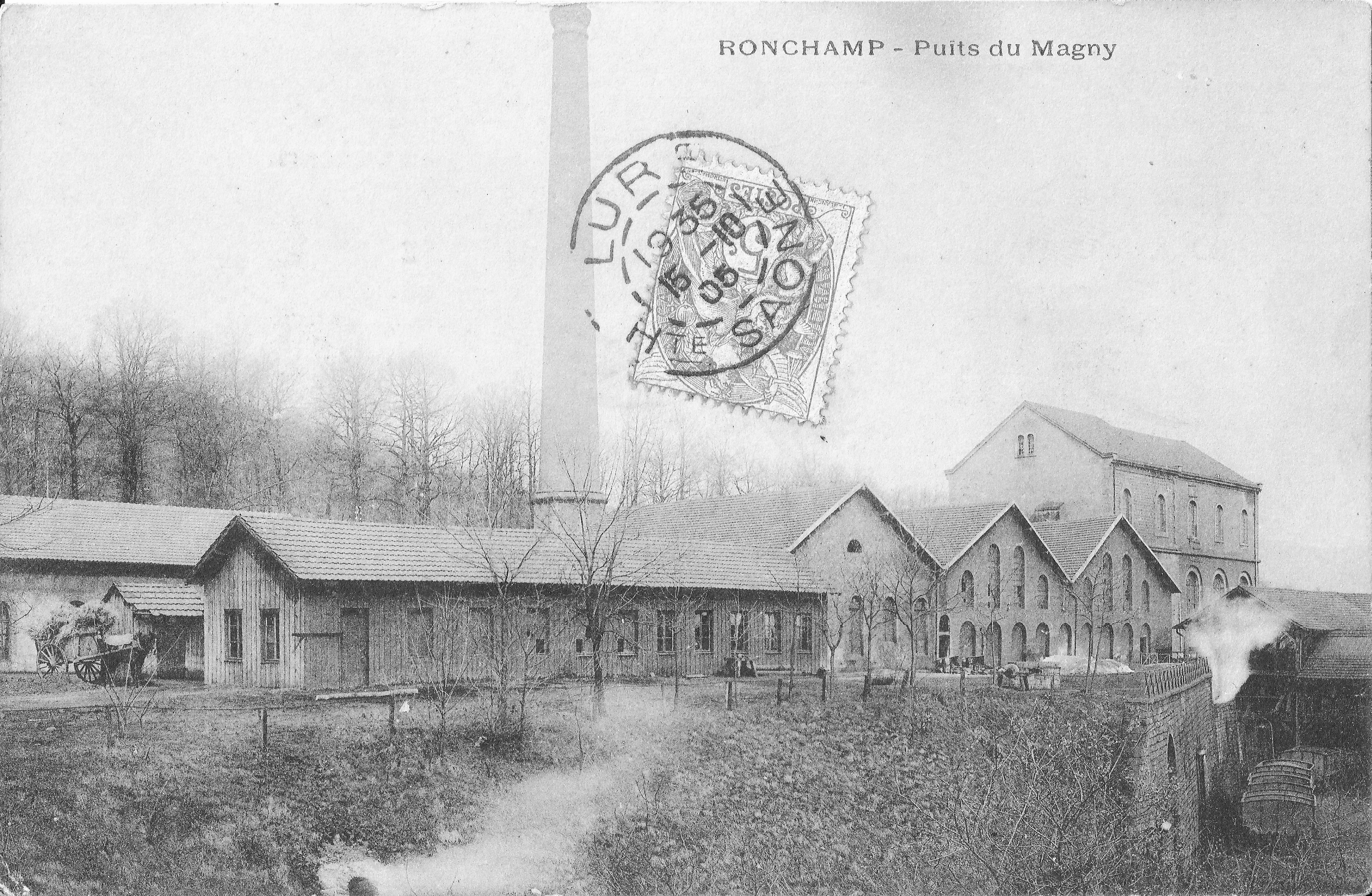 Le puits du Magny en activité.